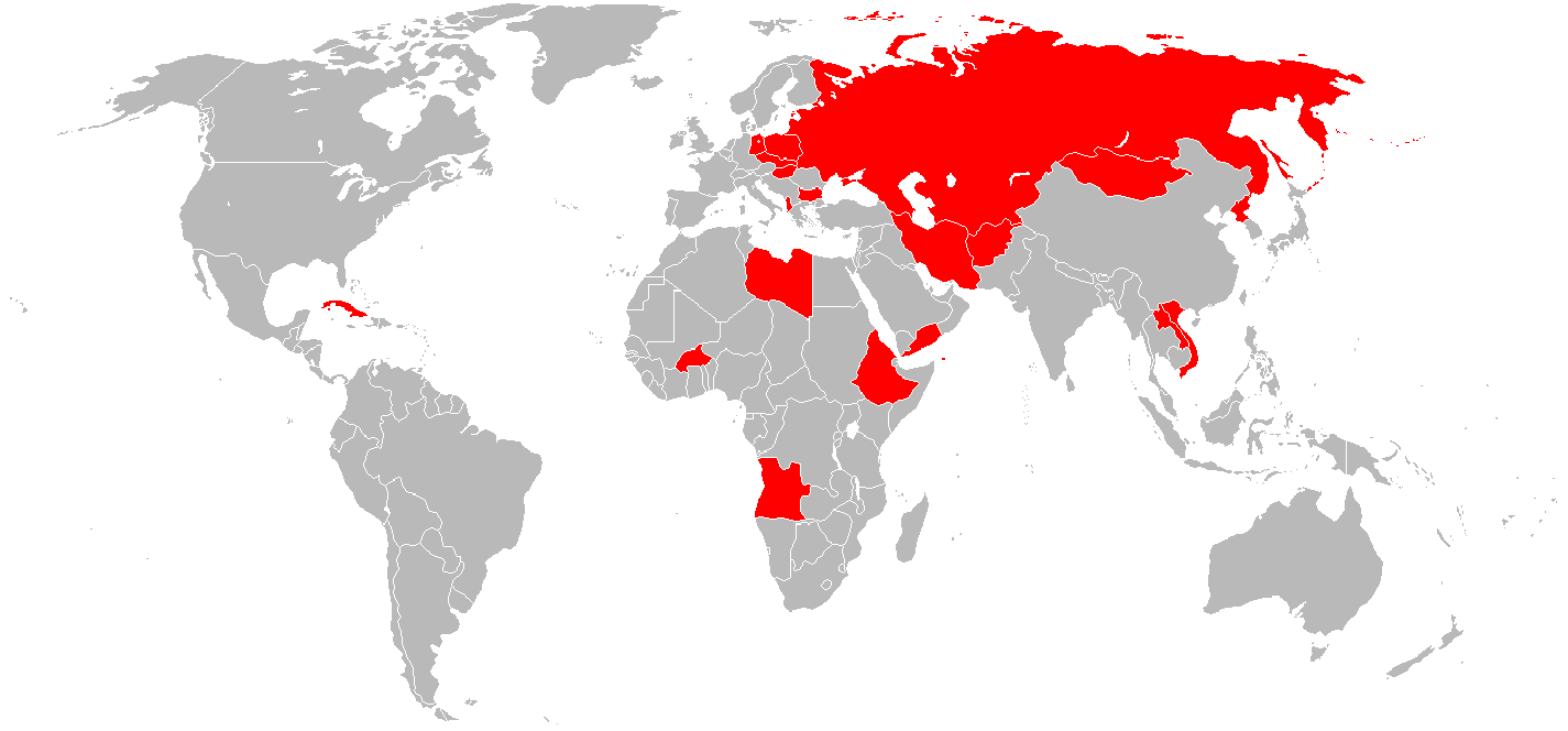 1984년 하계 올림픽 보이콧 국가